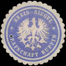 Sealing stamp Title: Kreis-Siegel Grafschaft Ruppin Description: blau, weiß, geprägt Place: Neuruppin size: 3 cm